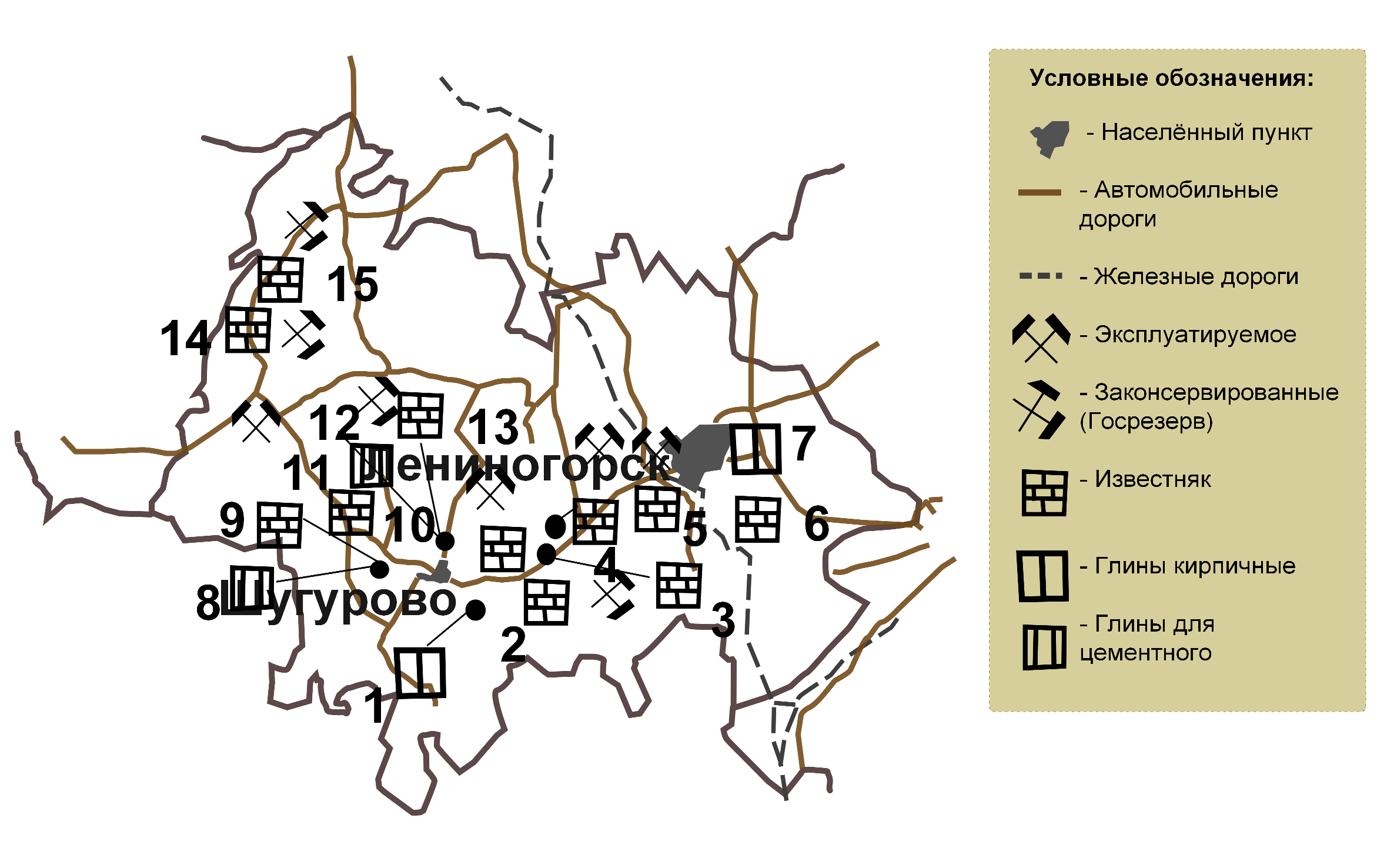 Карта месторождений глины и карбонатных пород на территории Лениногорского муниципально образования в соответствии с данным "ВСЕГЕИ" на 2010 год.